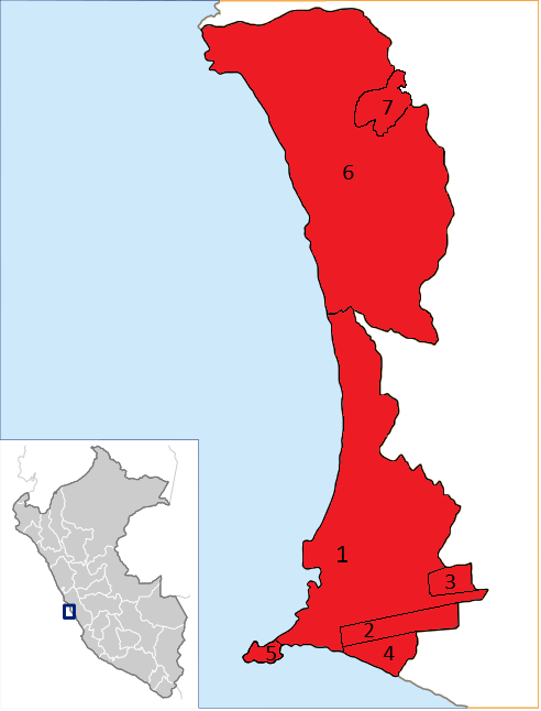 Mapa de la Organización Política-Administrativa del Callao